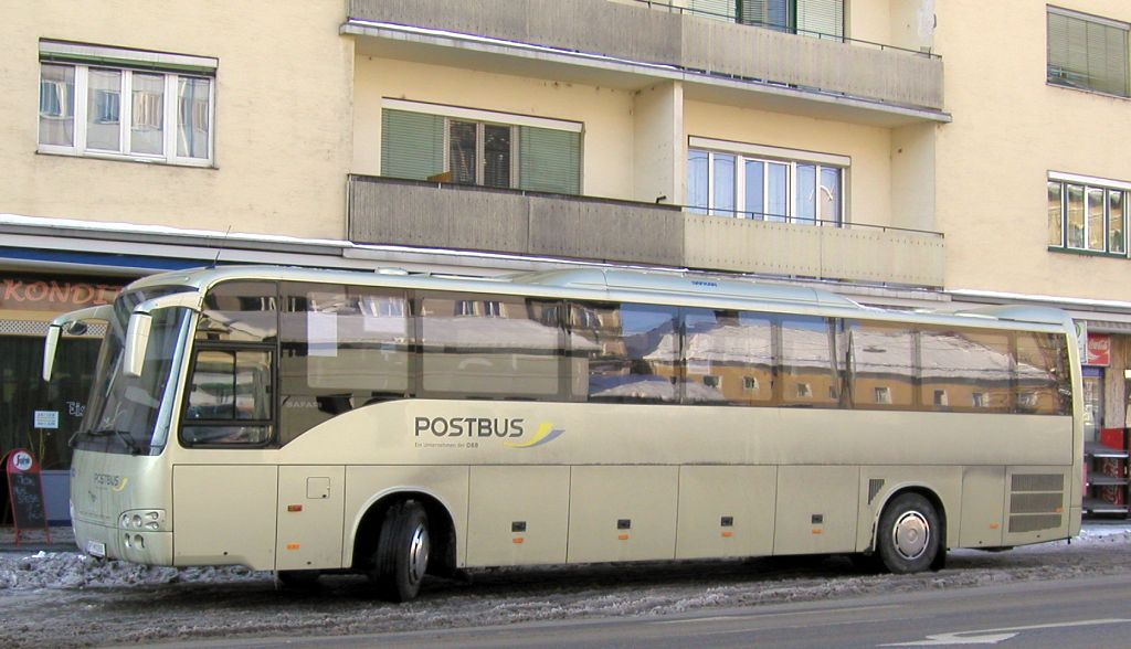 Wikipedia:Temsa Safari IC of ÖBB Postbus GmbH. Graz, Griesplatz, 30. Dezember 2005 Photo: tobias b köhler